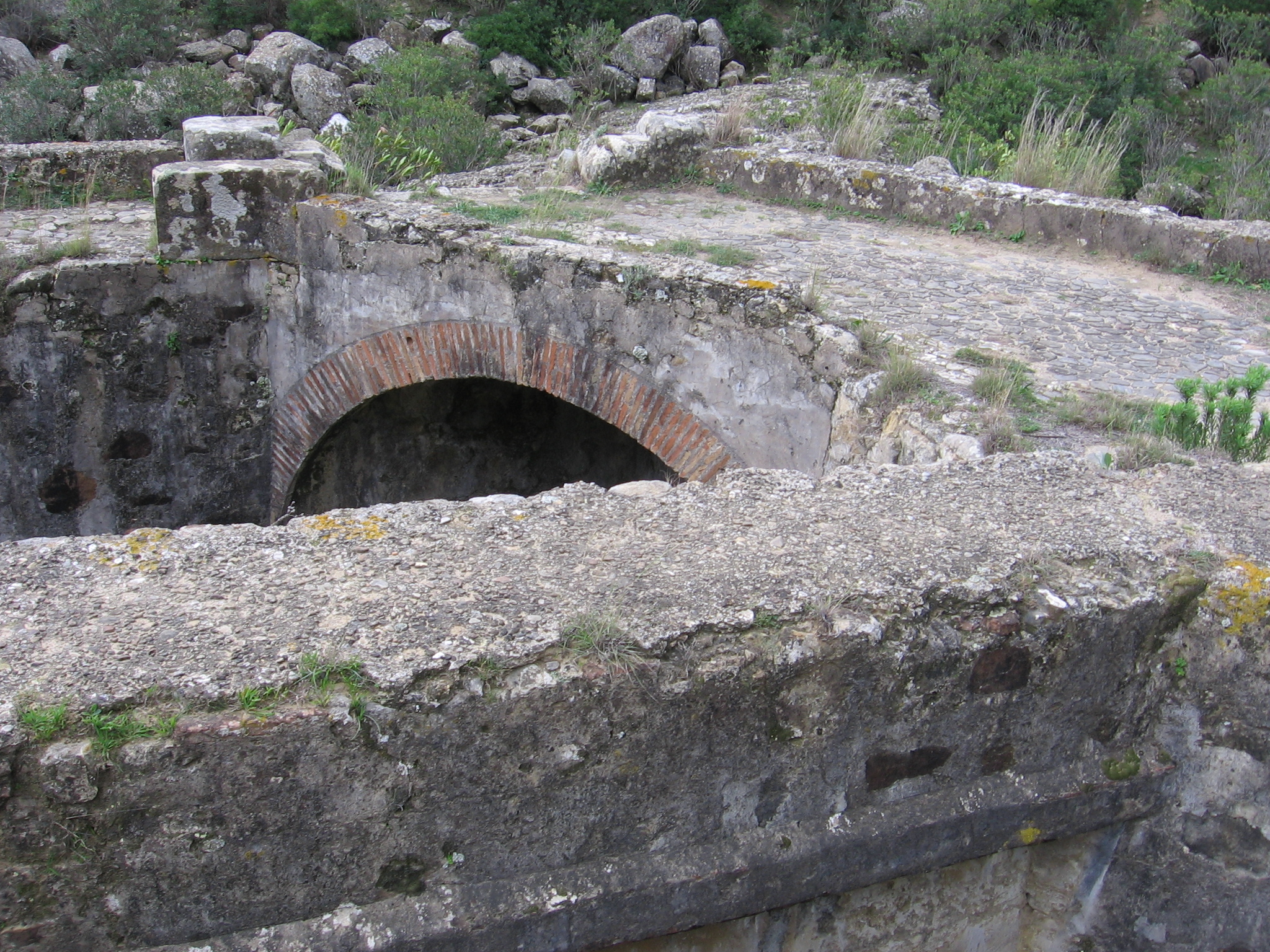 Cao de la Real Fábrica de Artillería (Jimena de la Frontera). Esta fábrica, considerados los segundos altos hornos de Andalucía, comenzó a fundir en 1777 y se tuvo que abandonar en 1788, debido a que el río un año sufría sequía y al siguiente inundaciones, tan grandes que hacían imposible el funcionamiento de los molinos.